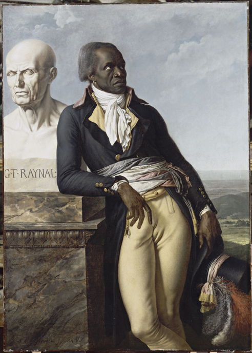 Jean-Baptiste Belley (1747-1805), représentant de Saint Domingue en 1797, Membre de la Convention et député aux Cinq-Cents. Ce portrait est la première représentation d'un homme noir dans la position d'un législateur occidental. Jean-Baptiste Belley s'appuie sur le piédestal du buste en marbre de l'abbé Guillaume Thomas François Raynal, sculpté par Espercieux. A droite, derrière Belley un paysage de montagnes du nord de Saint-Domingue près du Cap-Français. On distingue la fumée blanchâtre d'une raffinerie sucrière ainsi que la mer à l'horizon.